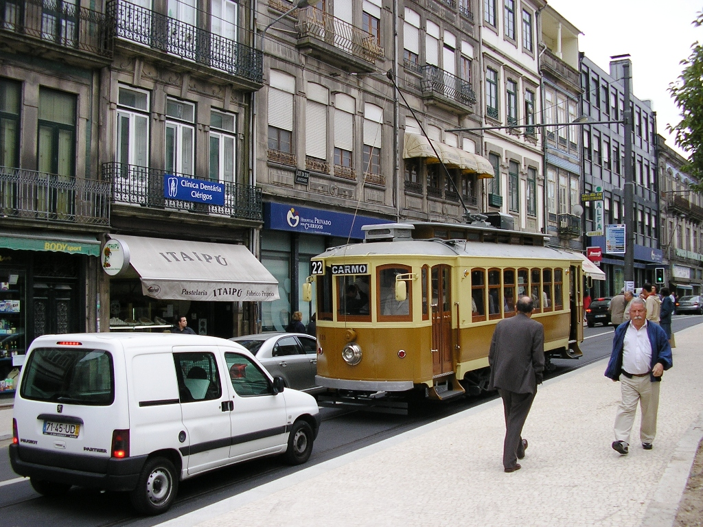 Guilherme Gomes Fernandes square in Porto, Portugal